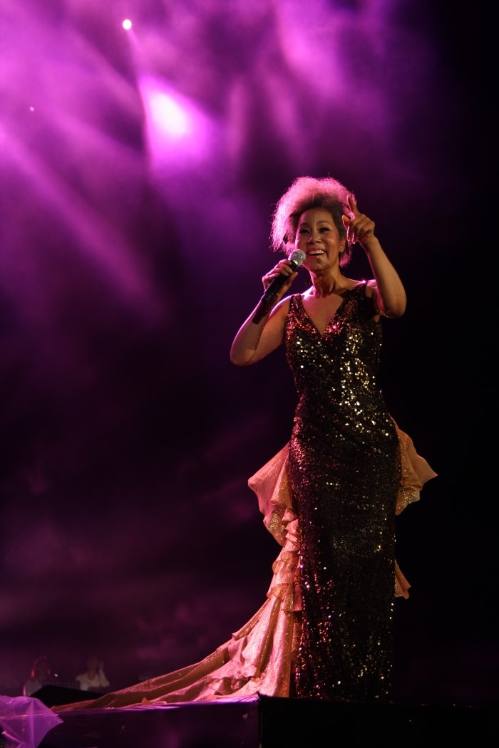 2012년 7월 11일 여수 엑스포 팝 페스티벌에서 인순이.